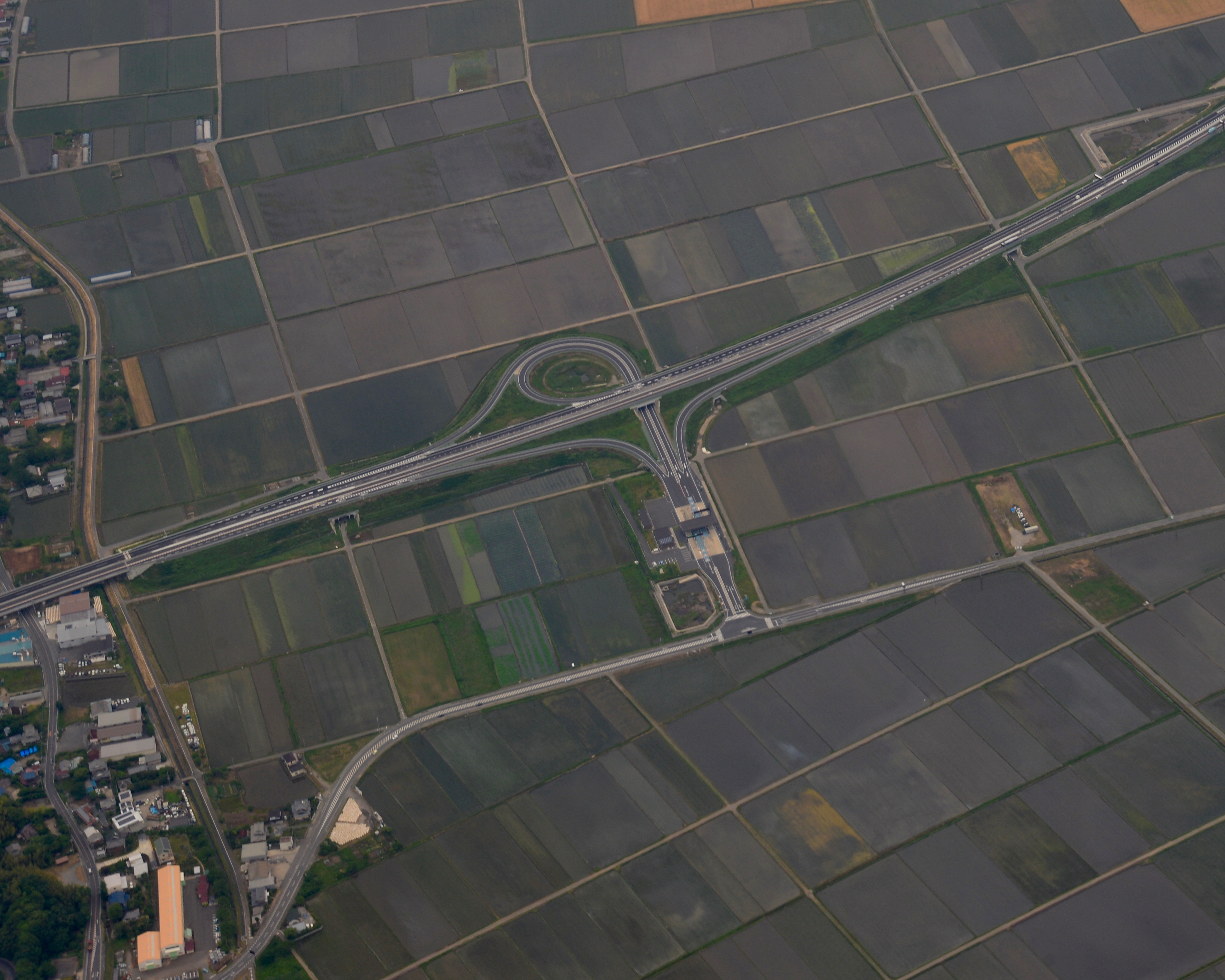 圏央道稲敷東インターチェンジ空撮